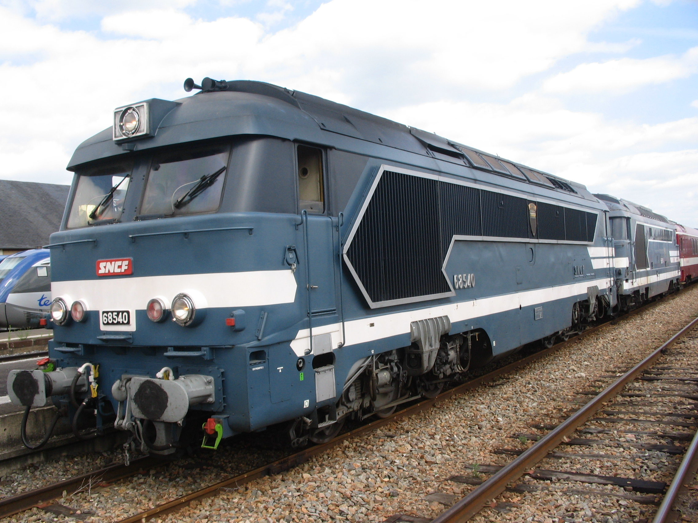 Locomotive diesel-électrique A1AA1A 68500 en UM avec BB 67500, tête d'une composition spéciale, gare de Montluçon (03), Festirail 2015.